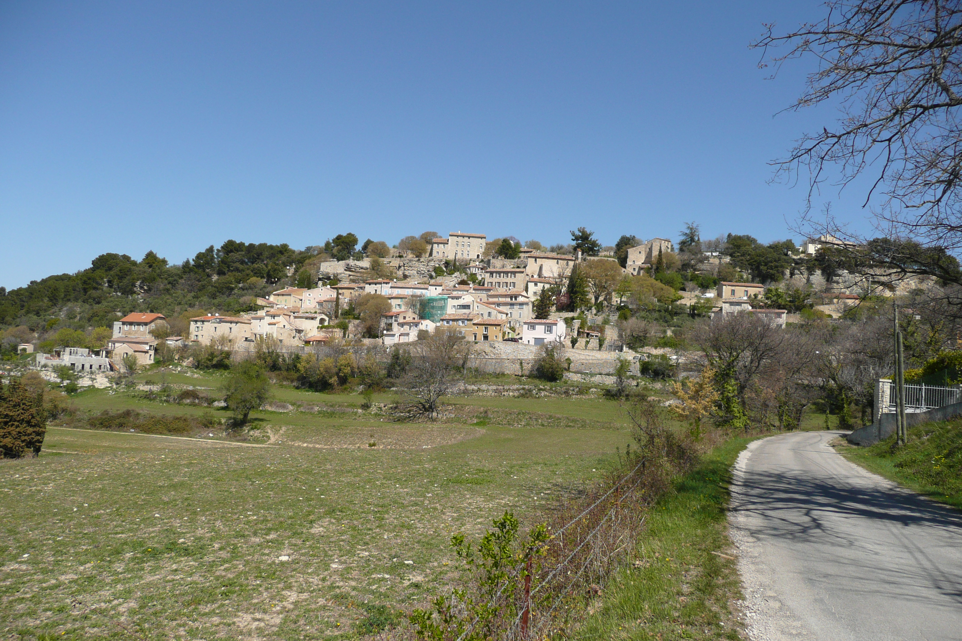 Vue sur La Roque sur Pernes.